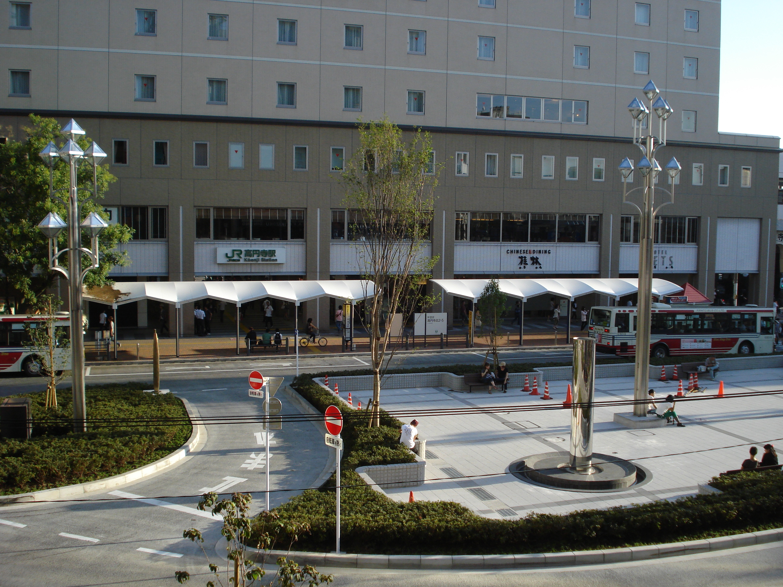 tokyo